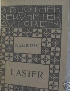 Laster und andere Geschischten, traduction allemande de contes d'Octave Mirbeau (1848-1917), inédits en volume en France